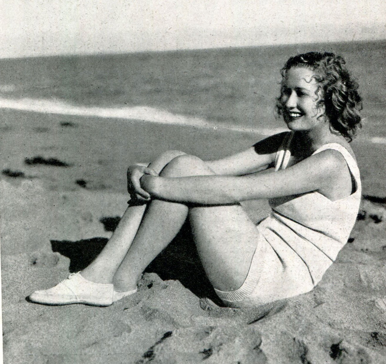 L'attrice Miriam Hopkins in una immagine diffusa in Italia nel 1932